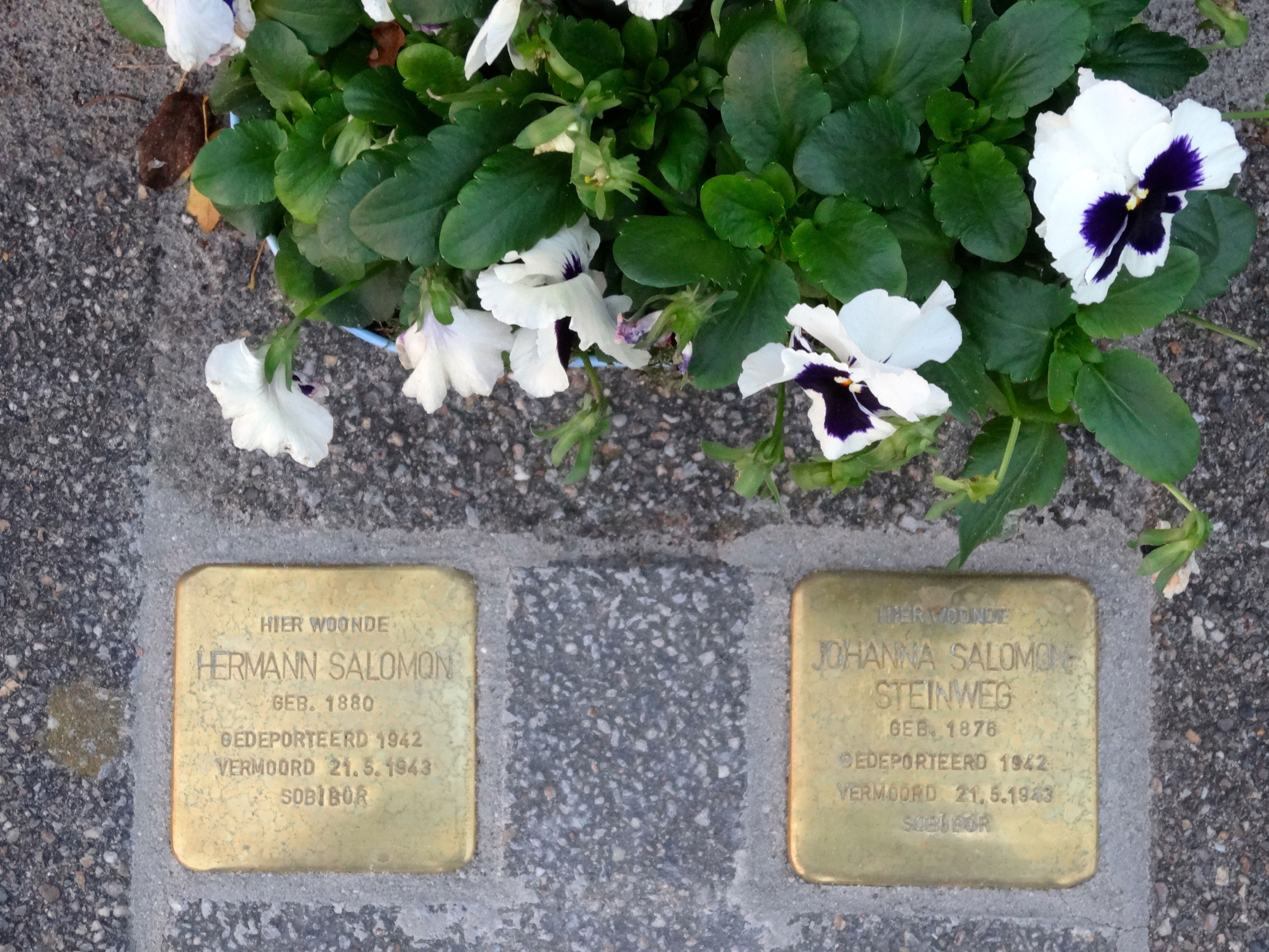 Stolpersteine - Gasselterstraat 25, Stadskanaal: Hermann Salomon en Johanna Salomon-Steinweg